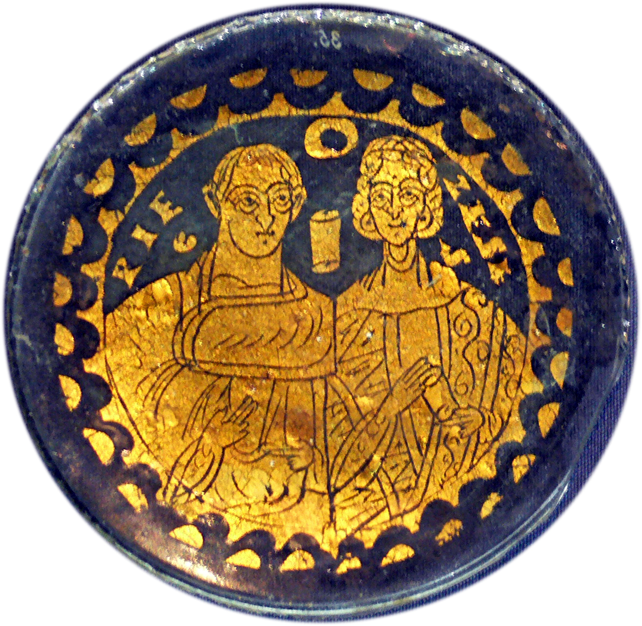 Wien, Kunsthistorisches Museum, Antikensammlung, Bodenfragment eines Glasbechers, Motiv: Ehepaar, spätrömisches Zwischengoldglas, 4. Jh. n. Chr., Inv. Nr. XIa 35 (Inschrift: "PIE ZESES")